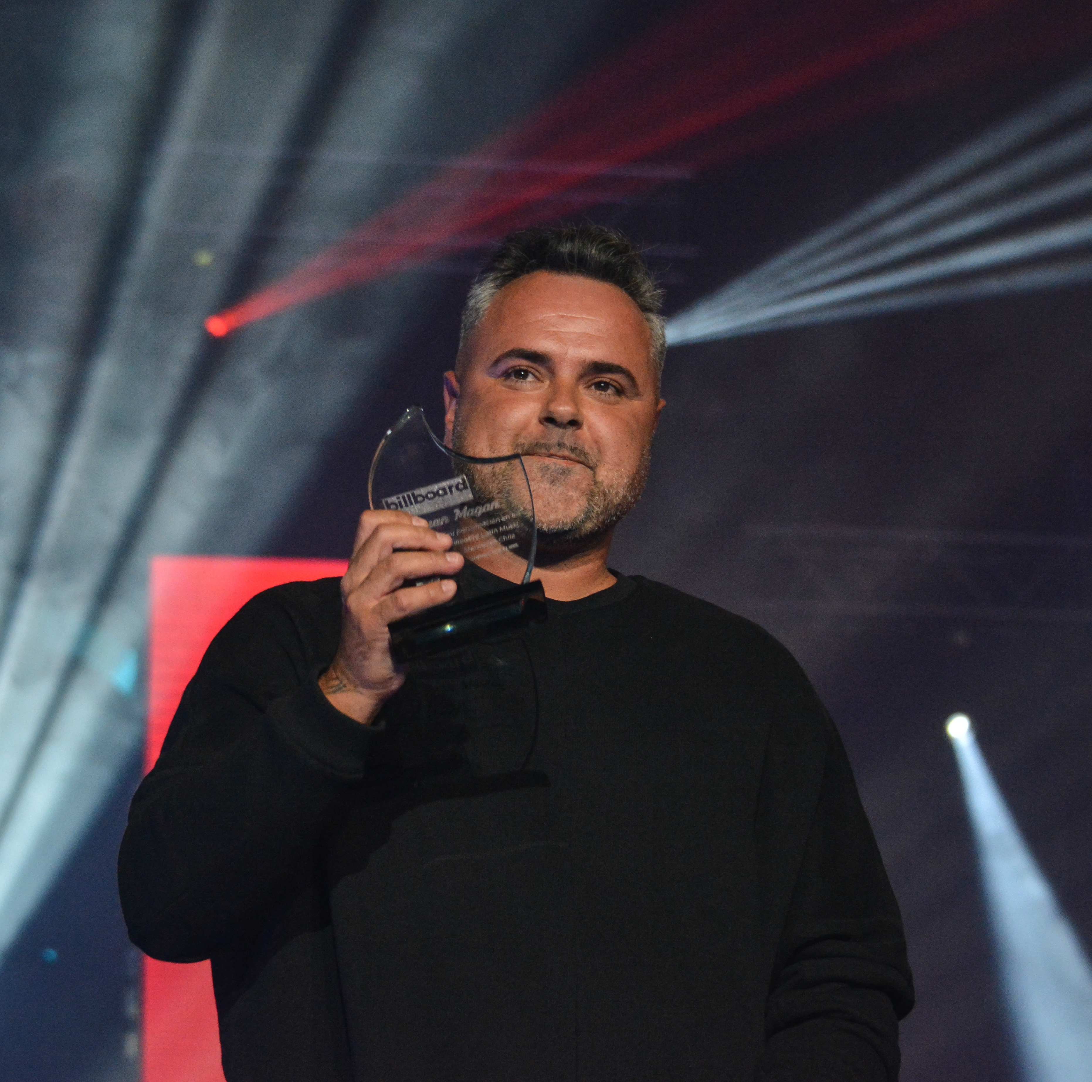 Billboard Latin Music Showcase Chile 2018, Movistar Arena, Santiago, Chile